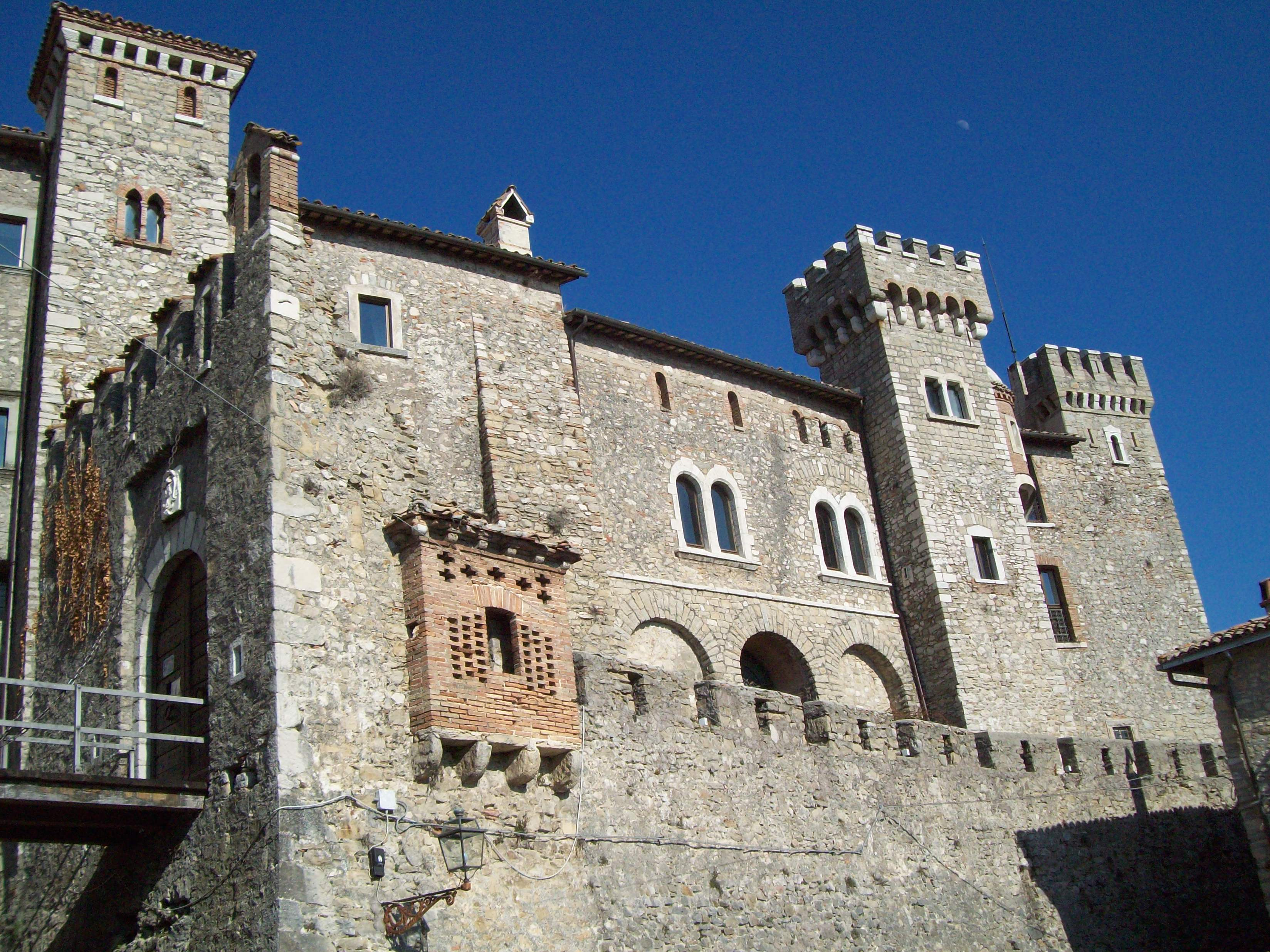 Collalto Sabino